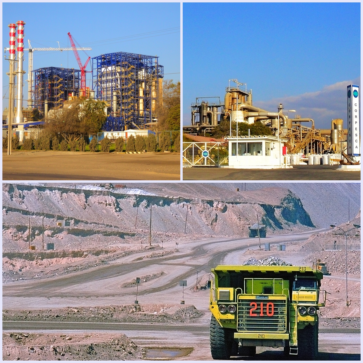 Actividad económica de la Región de Antofagasta